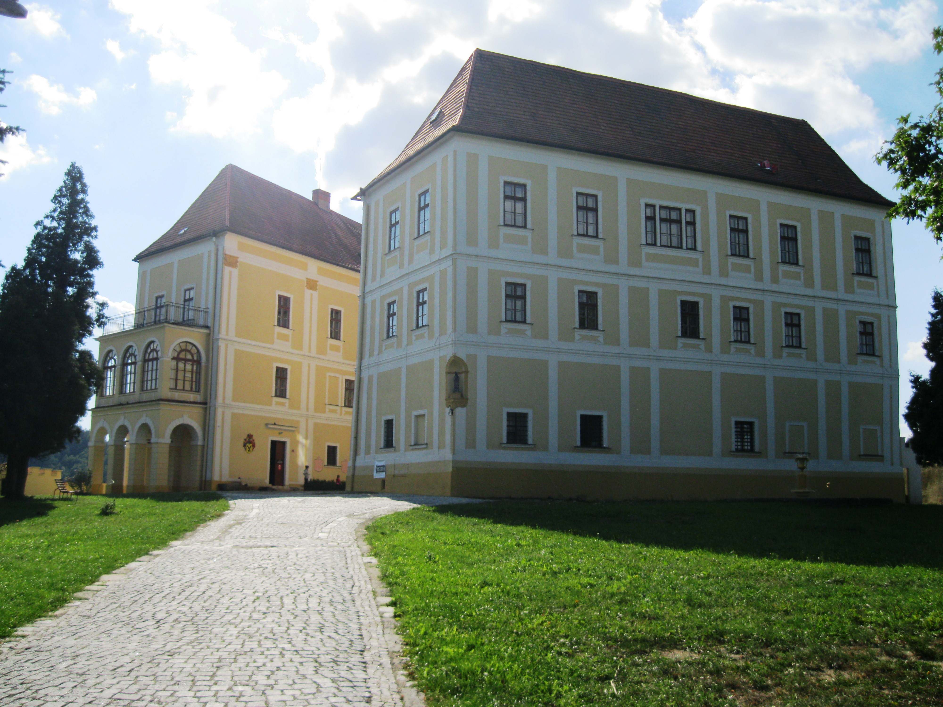 Zámek Letovice